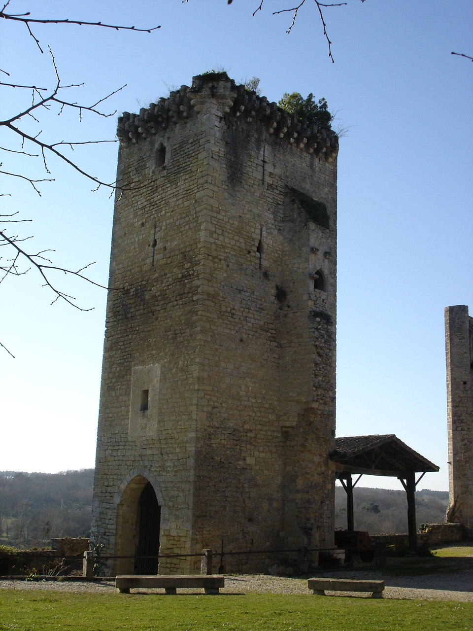 tour du château vieux de Roquetaillade (33 gironde france)